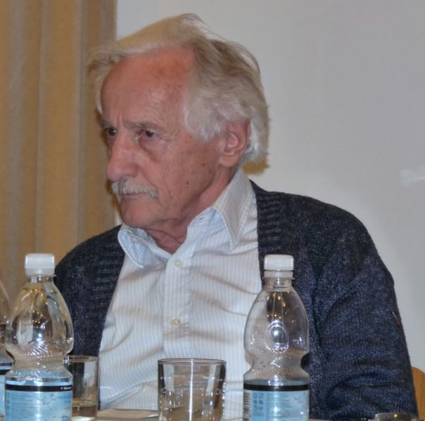 Veno Taufer